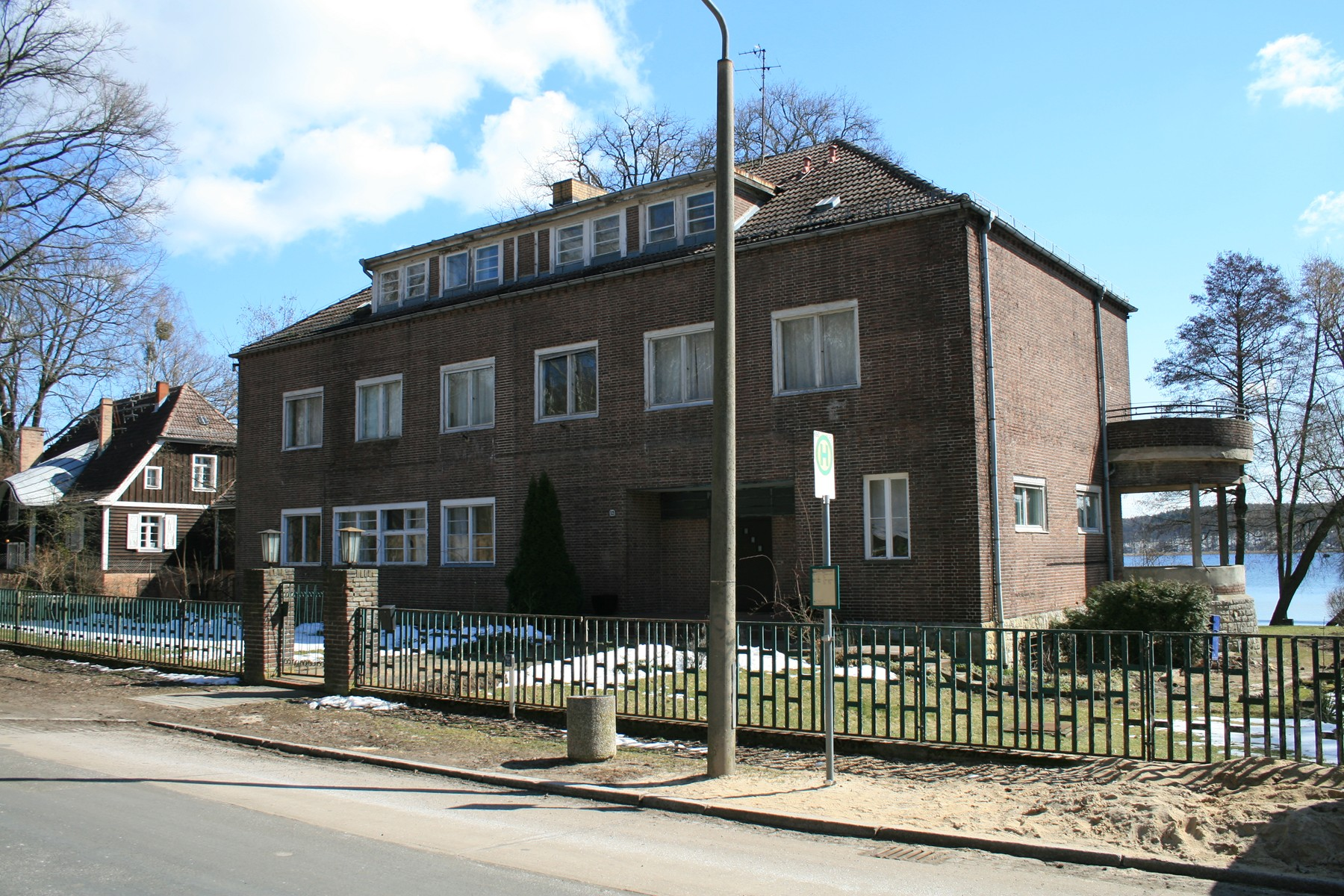 Potsdam OT Sacrow, Kladower Straße 12. Haus Perlis mit Garage, Resten der Gartengestaltung und Einfriedung. Baudenkmal